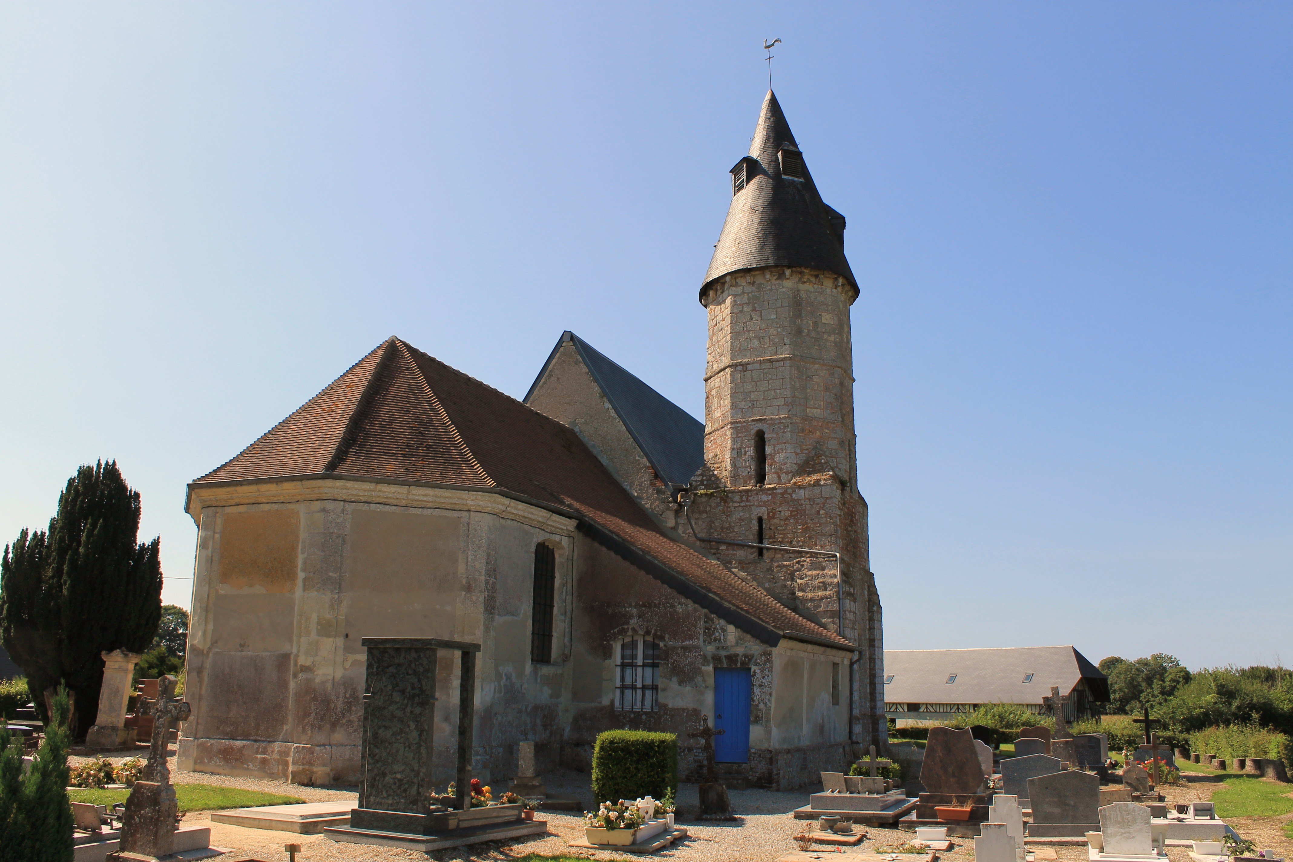 Église Saint-Germain de Drubec (Calvados). Clocher du XIIe